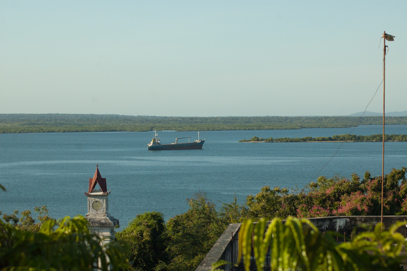 Port of Tanga, Tanzania